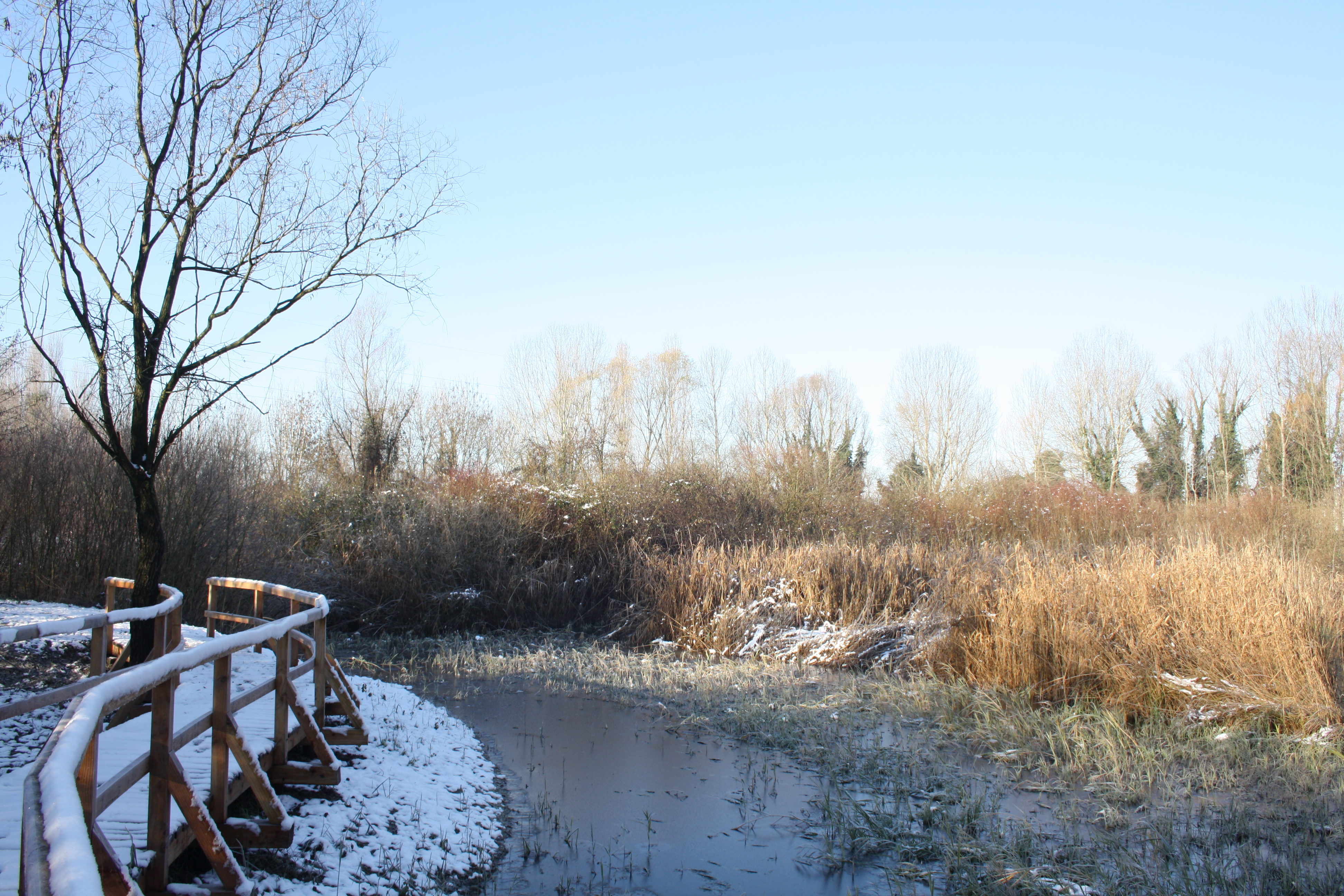 Parco Nuove Gemme, Spinea